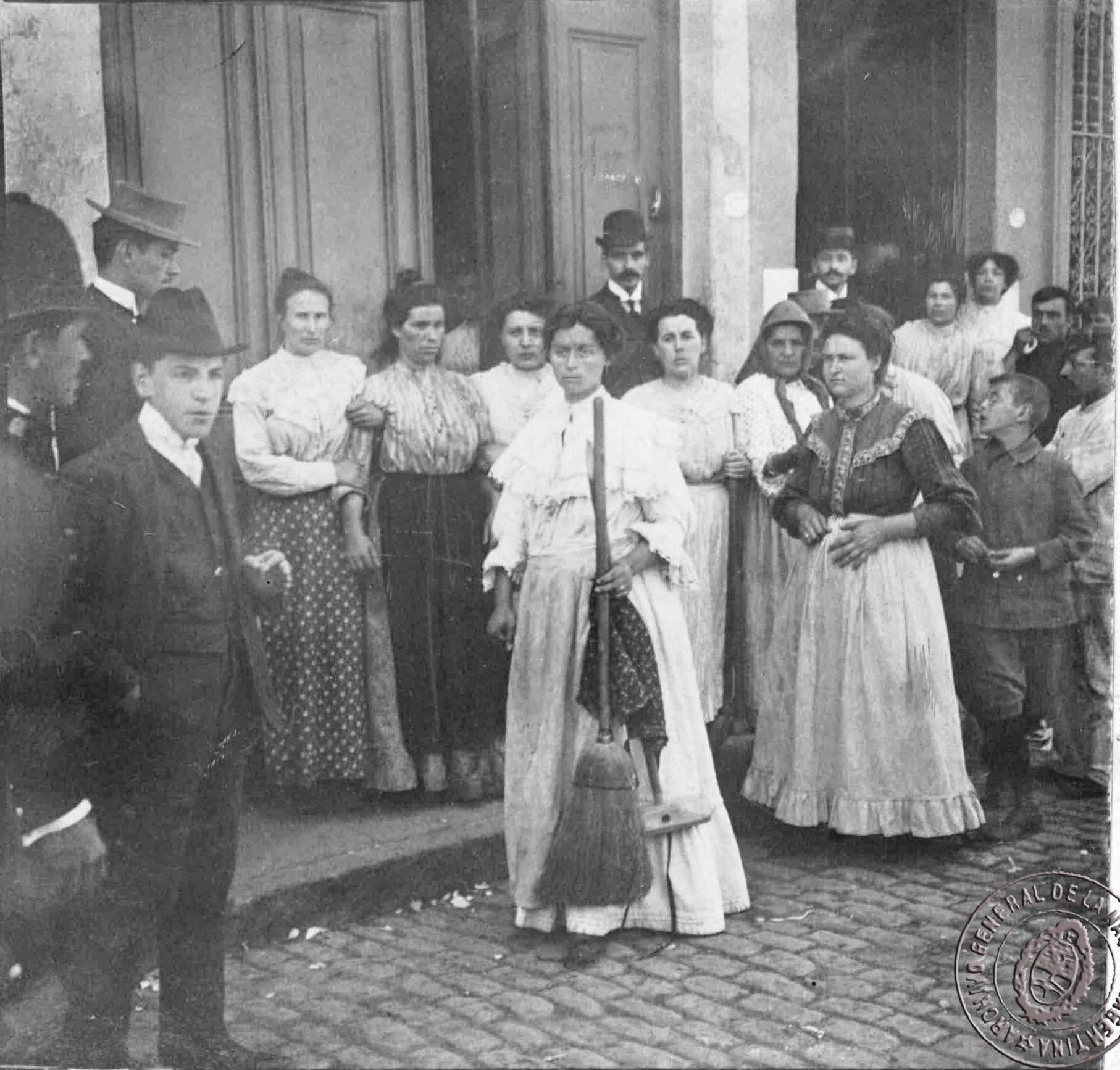 Documento Fotográfico. Archivo general de La Nación. Inventario 18191